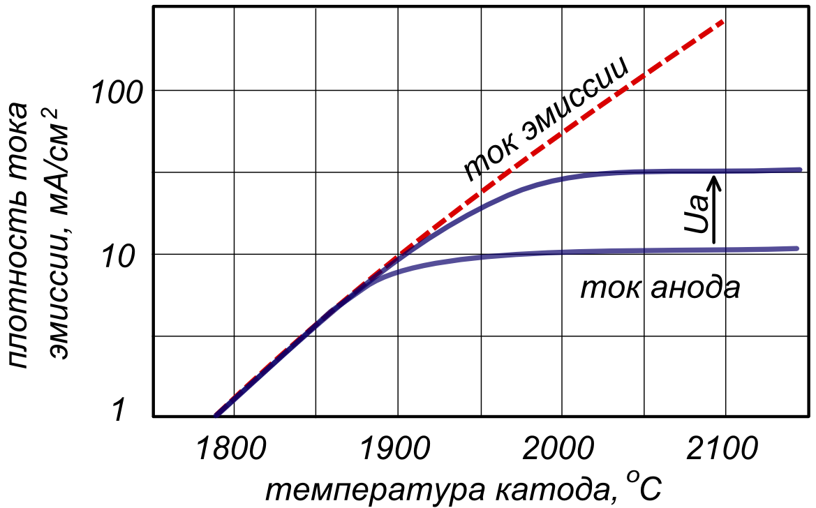 Эмиссионная характеристика вакуумного диода с вольфрамовым катодом. Пунктир: ток эмиссии. Сплошные линии: наблюдаемый ток анода